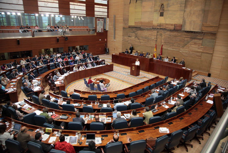 Debate del Estado de la región 09